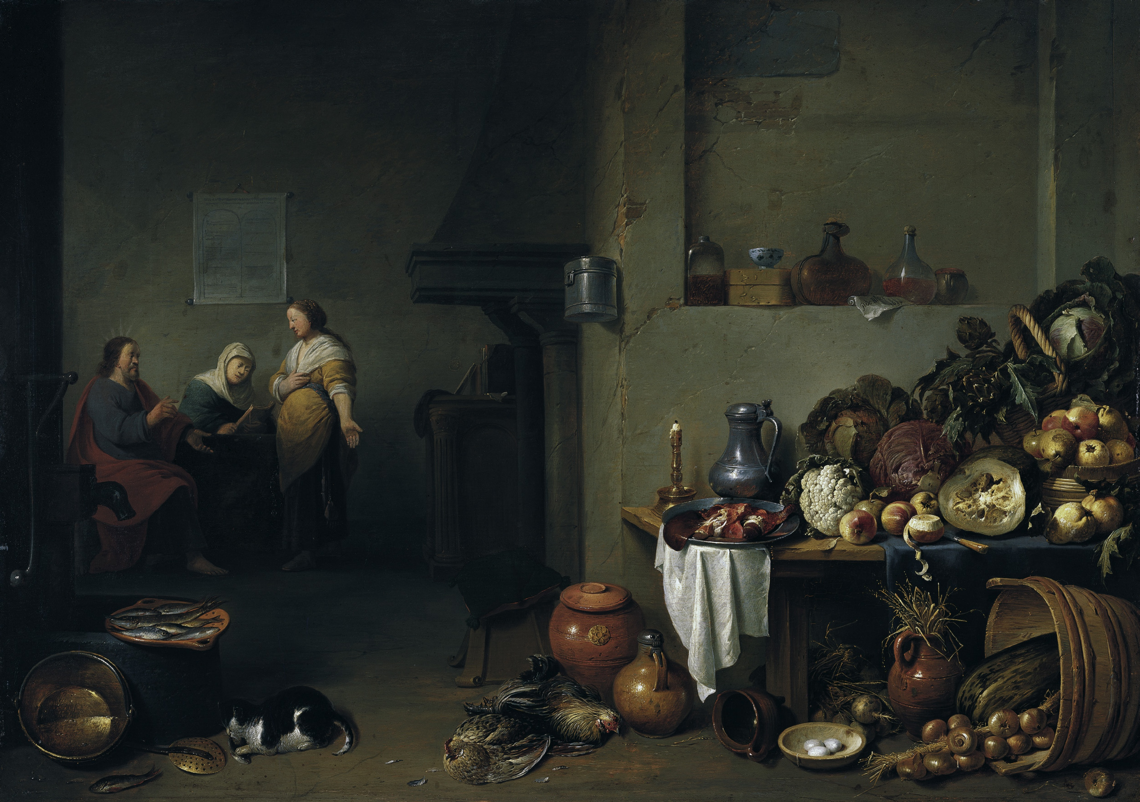 In seinem Bild "Christus bei Maria und Martha" kombinierte Pieter de Bloot die religiöse Szene mit einem Küchenstillleben im Vordergrund. Dieser Bildtyp war zur Entstehungszeit des Gemäldes 1637 bereits veraltet und geht auf Kompositionen von Pieter Aertsen (1507/08– 1575) aus der Mitte des 16. Jahrhunderts zurück. Dass die sakrale Darstellung in den Hintergrund gedrängt scheint, ist kein Ausdruck schwindenden Interesses am Glauben und seiner Botschaft. Im Gegenteil: Diese wertende Anordnung ist Symbol für den Dualismus des menschlichen Lebens. Dem Menschen steht meist sein körperliches Wohlbefinden symbolisiert durch das Stillleben aus prächtigen Früchten, Gemüse et cetera näher als sein Seelenheil und damit auch sein Glaube an Gott. Es gilt also, die Versuchung durch die Genüsse des Alltags zu überwinden und durch die Hingabe an die wahren Werte des Lebens seine Seele zu retten. Dabei zeigen Maria und Martha durch ihre unterschiedlichen Charaktere die zwei Möglichkeiten auf, Gott zu dienen: Martha mit dem Buch in der Hand steht für die "Vita contemplativa", also für Studium und Meditation. Maria mit Schürze und tatkräftig aufgekrempelten Ärmeln steht für die "Vita activa", den Weg der guten Taten. Der sinnliche Aspekt des überreichen Arrangements an Köstlichkeiten am Küchentisch spielt auch auf die Sexualität an: Die Katze, die den Fisch frisst, Vögel, Eier und Zwiebeln galten als erotische Symbole.